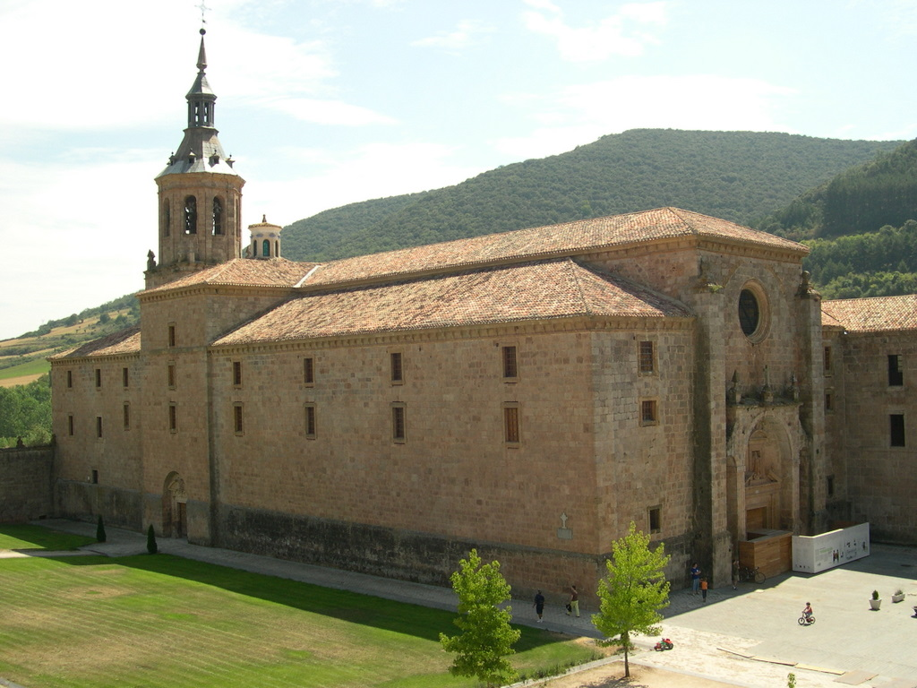 Monestir de San Millán de Yuso